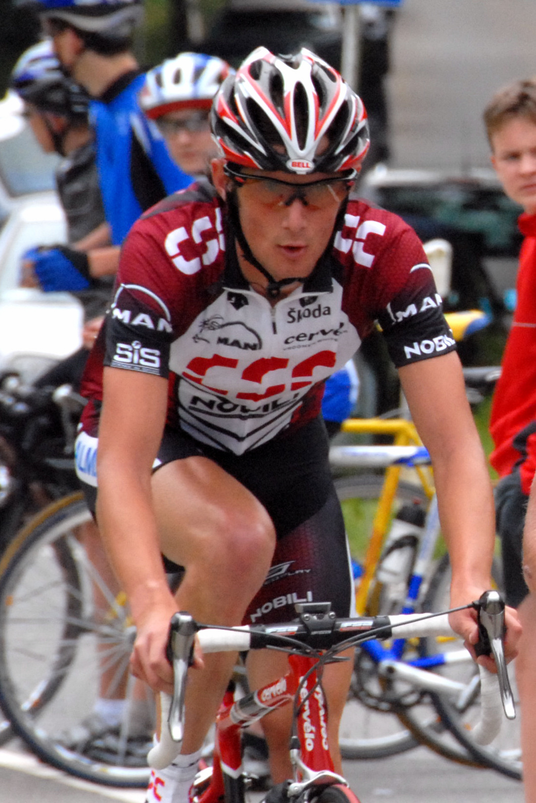 National Meeschterschaft op der Strooss 2007, Course en Ligne, de Fränk Schleck uewen um Keeler Poteau